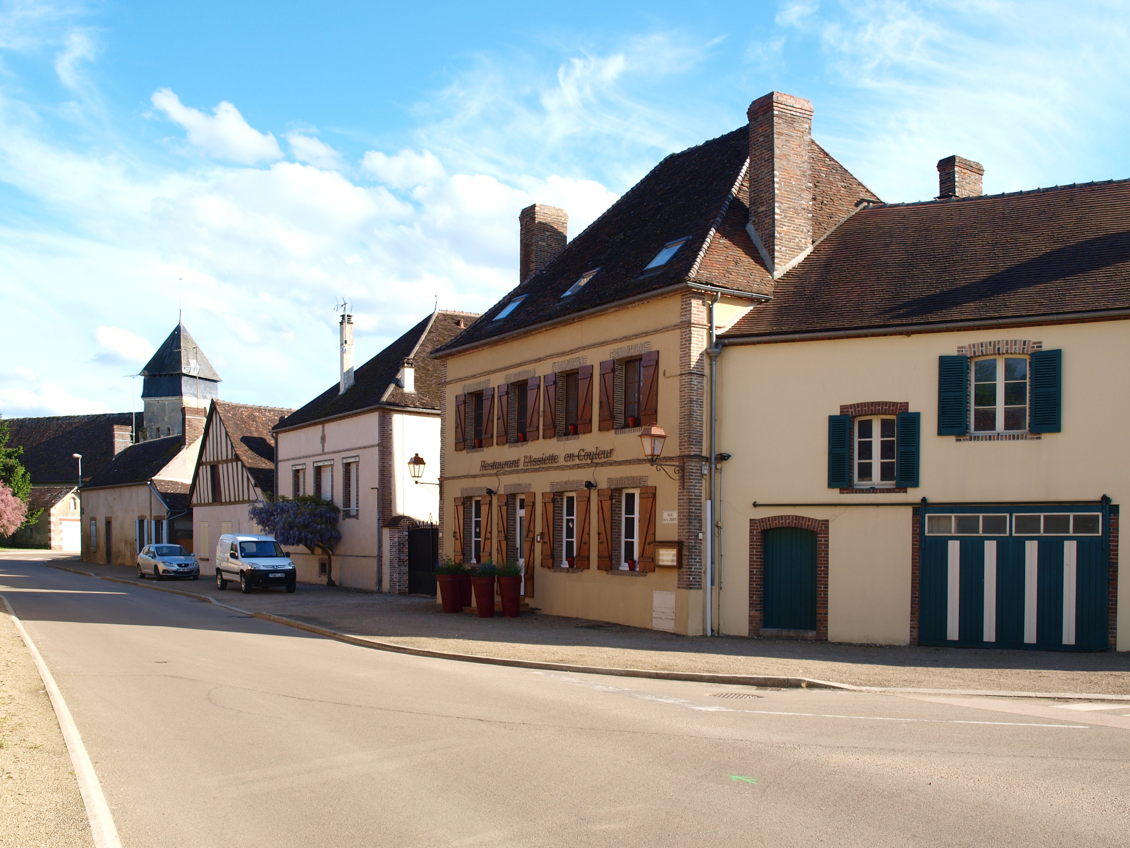 Dracy-sur-Ouanne (Yonne, France). Vue de la D 950, venant de Charny en direction du sud et de Toucy (la route continue vers l'est après le village). Le château est immédiatement à gauche de la photo, ses murs sont en bord de route.